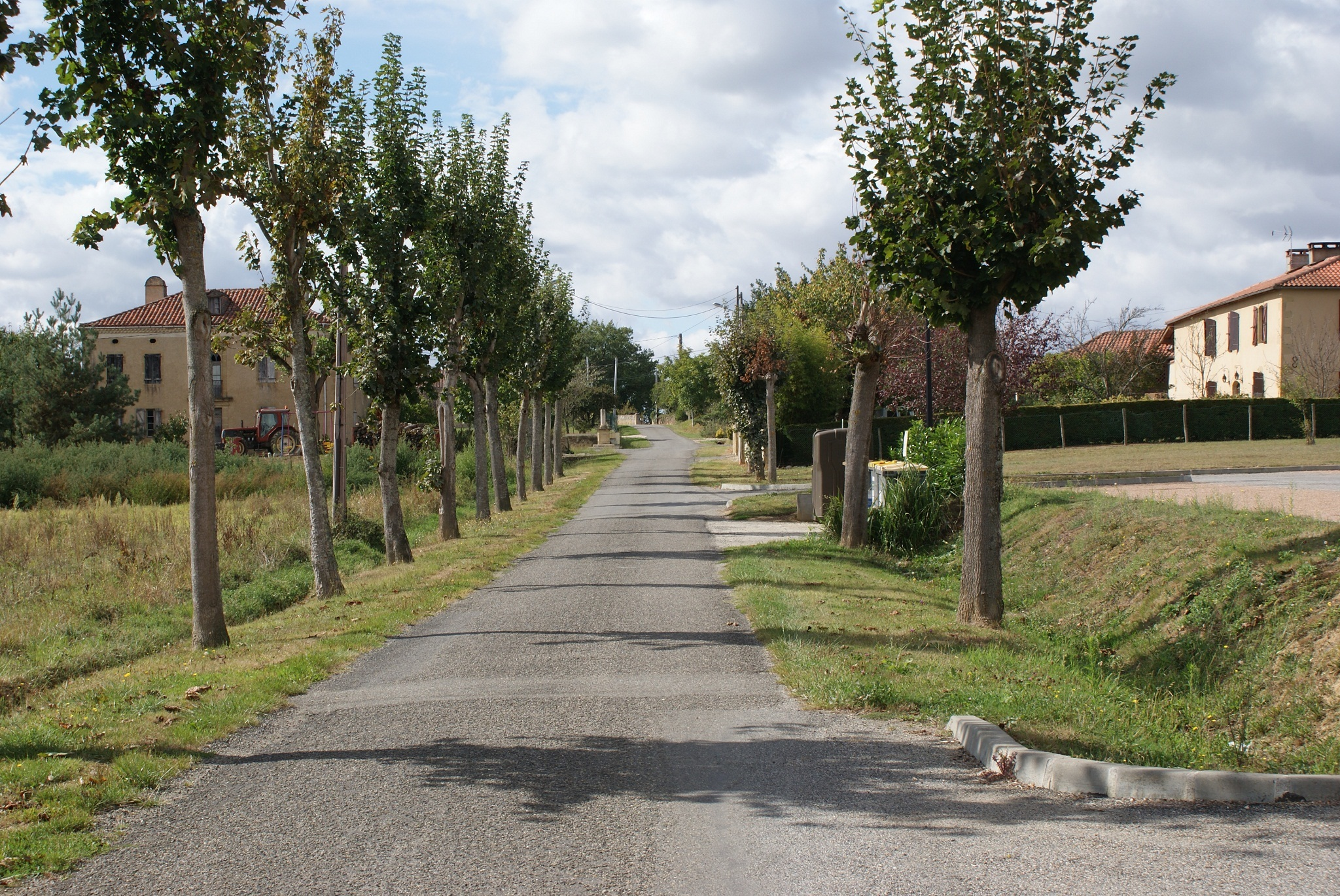 De hoofdstraat.